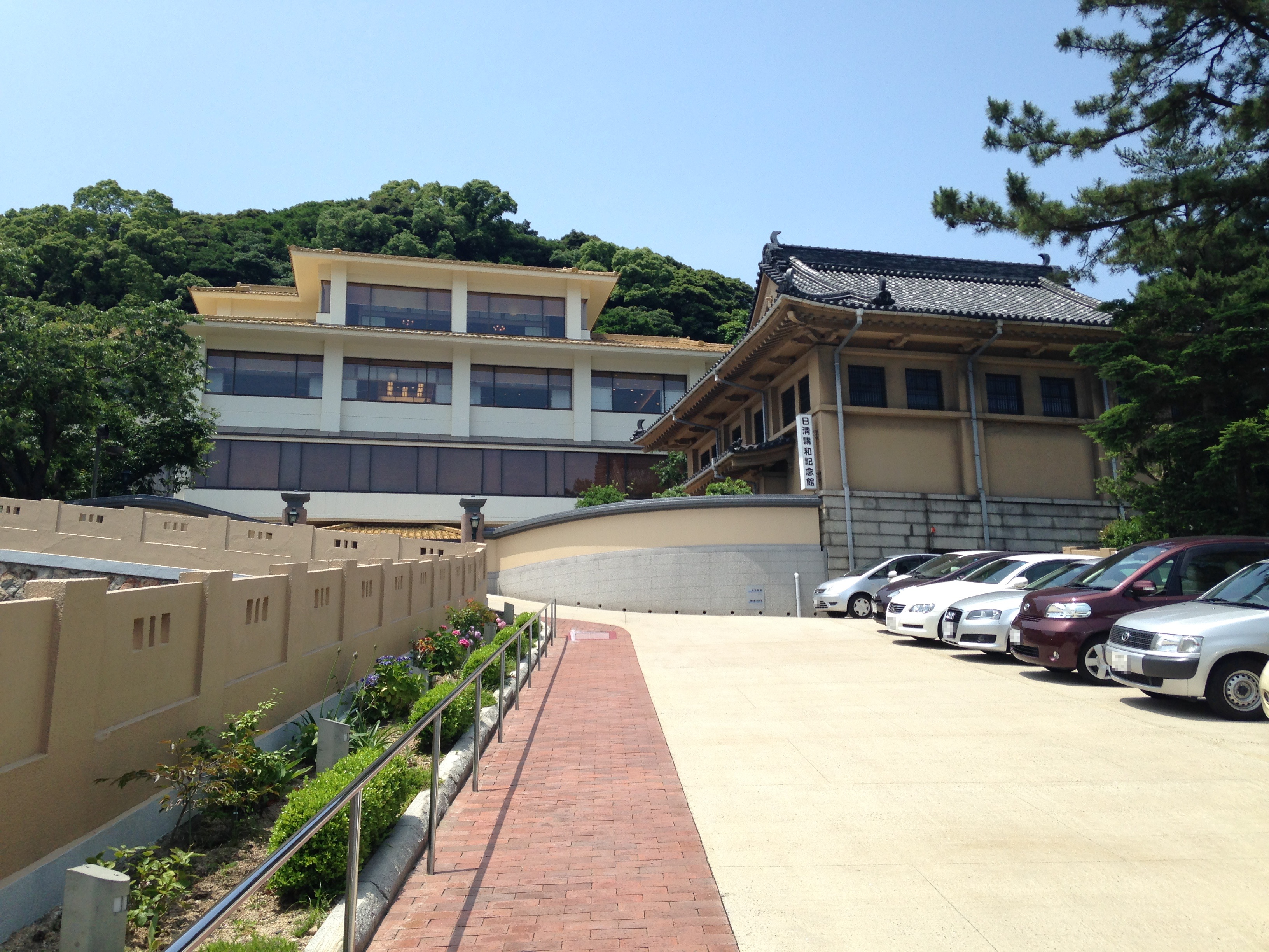 春帆楼の遠景